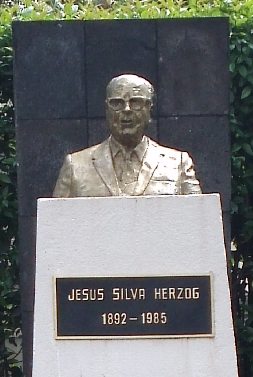 Busto en el sepulcro de Don Jesús Silva Herzog, en la Rotonda de las Personas Ilustres, Panteón Civil de Dolores, Ciudad de México.